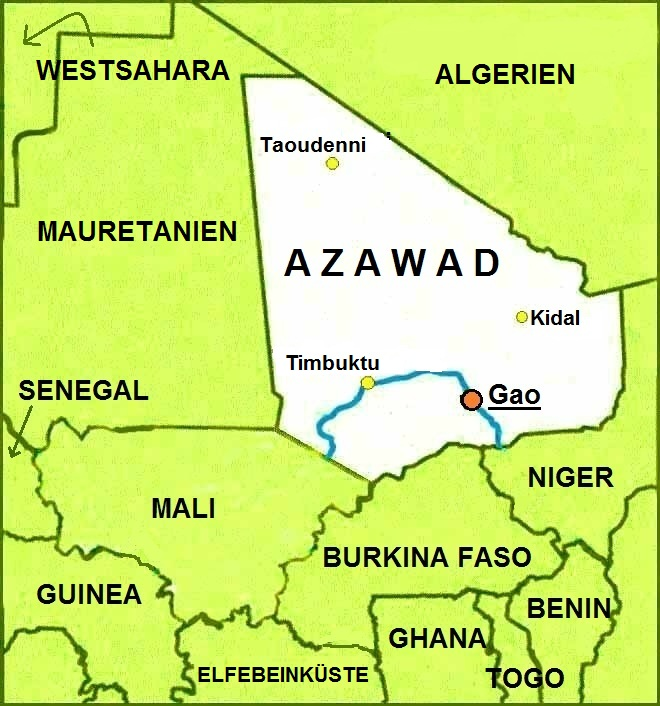 Karte von Azawad